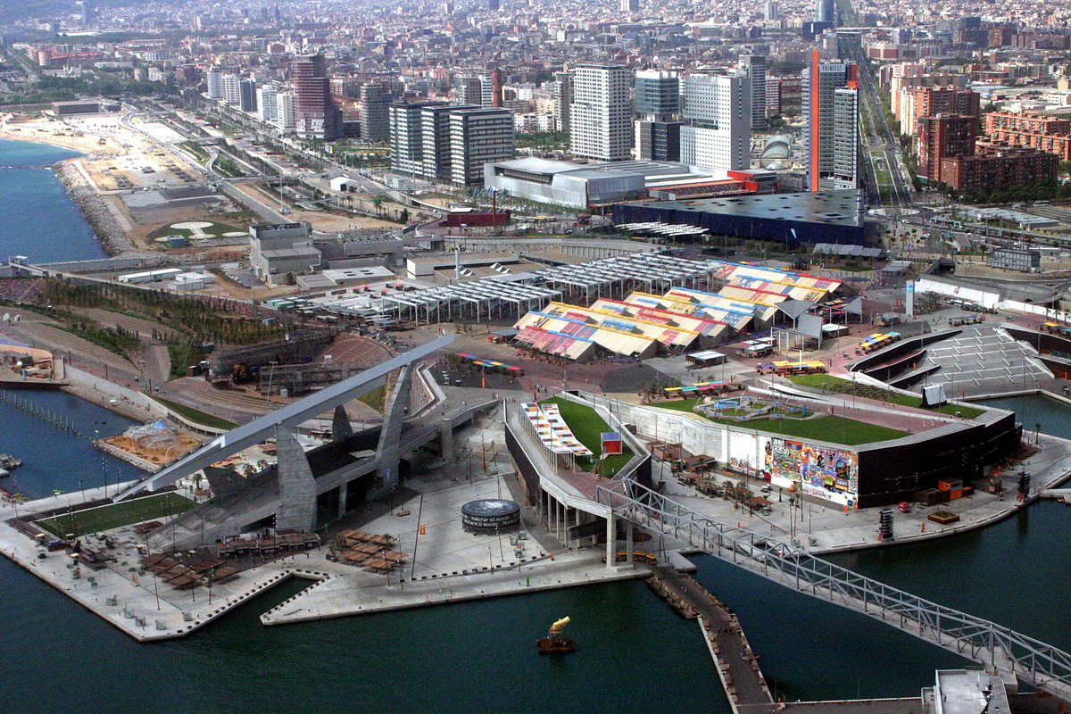 Vista aèria del Parc del Forum (Barcelona) durant la cel·lebració del Forum Universal de les Cultures 2004.